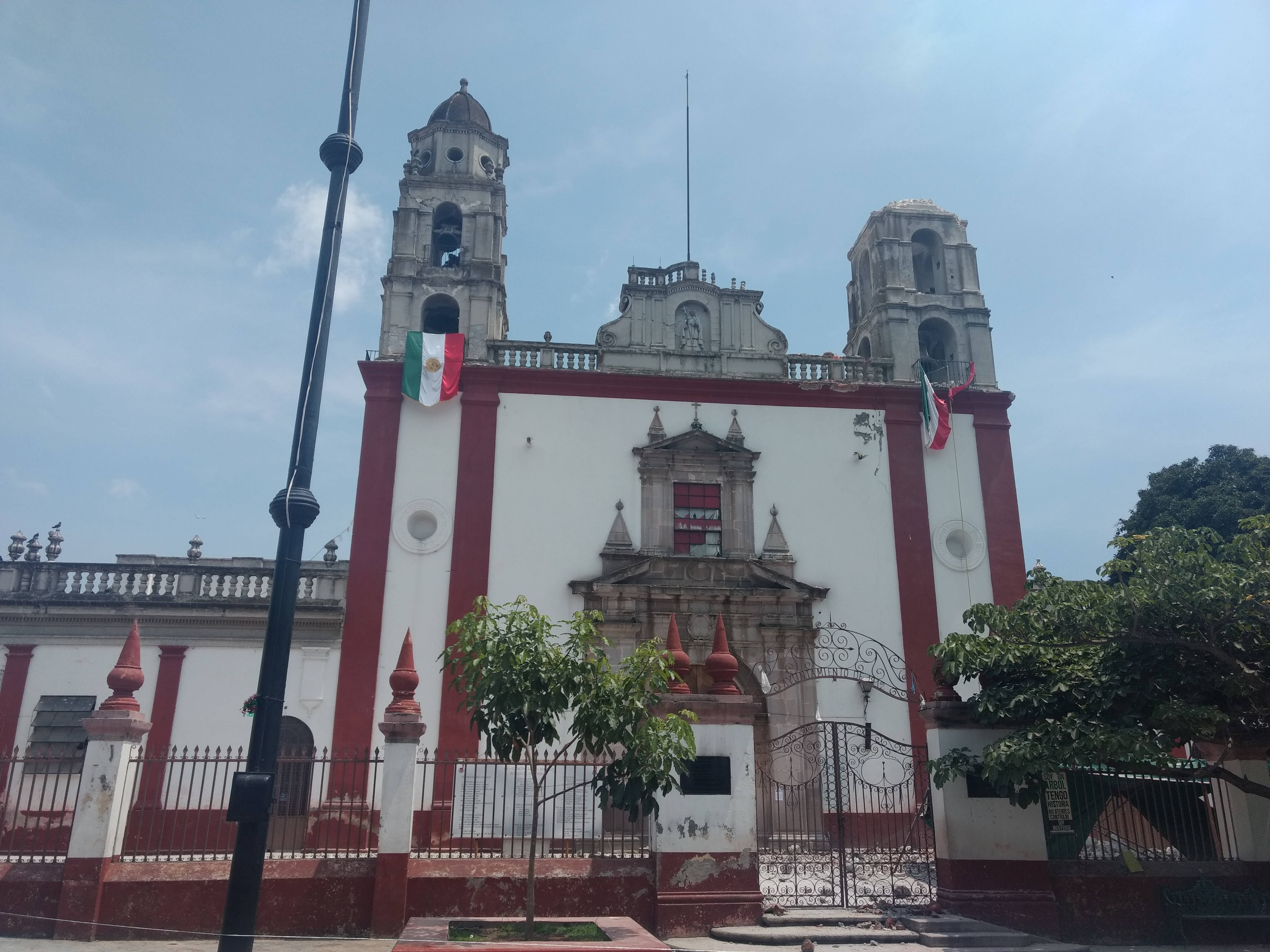 Iglesia de Santiago apóstol en cuautla después del terremoto del 19 de septiembre del 2017